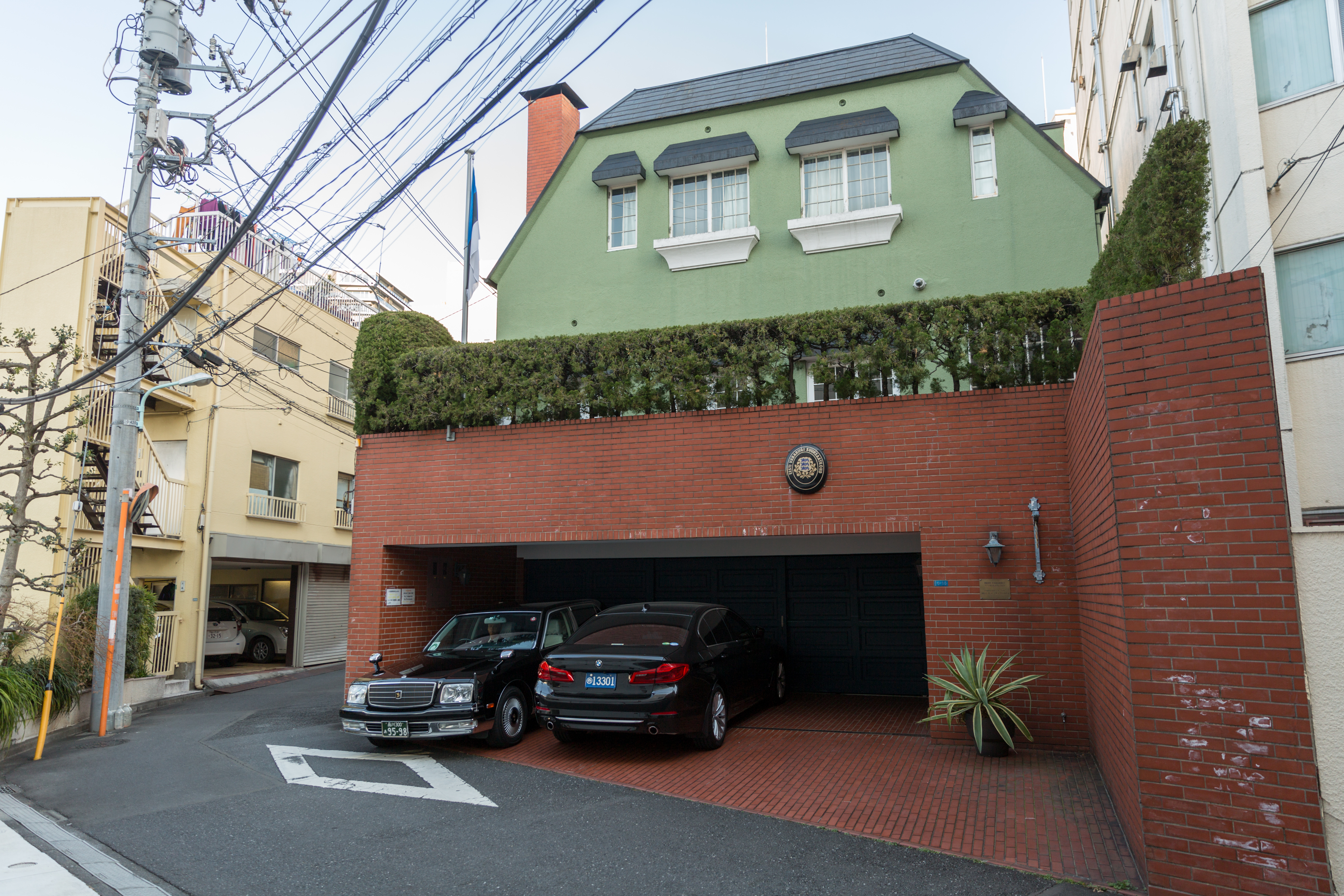 Eesti suursaatkond Tōkyōs